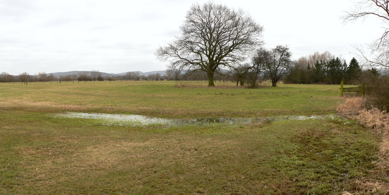 Burghügel von Hus Aren in Höhe der Baumgruppe